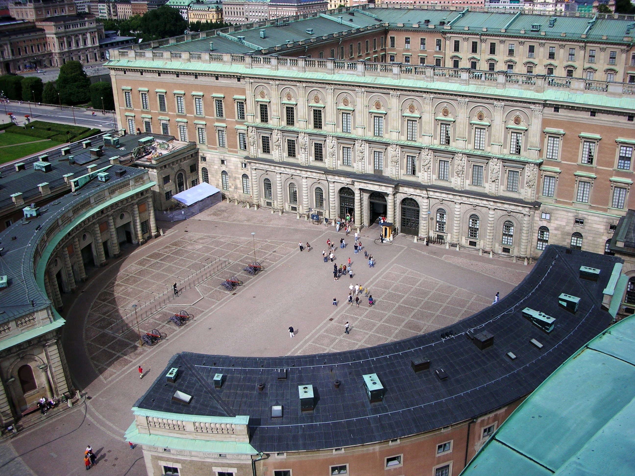 Yttre borggården, Stockholms slott, fotograferad från Storkyrkans torn.